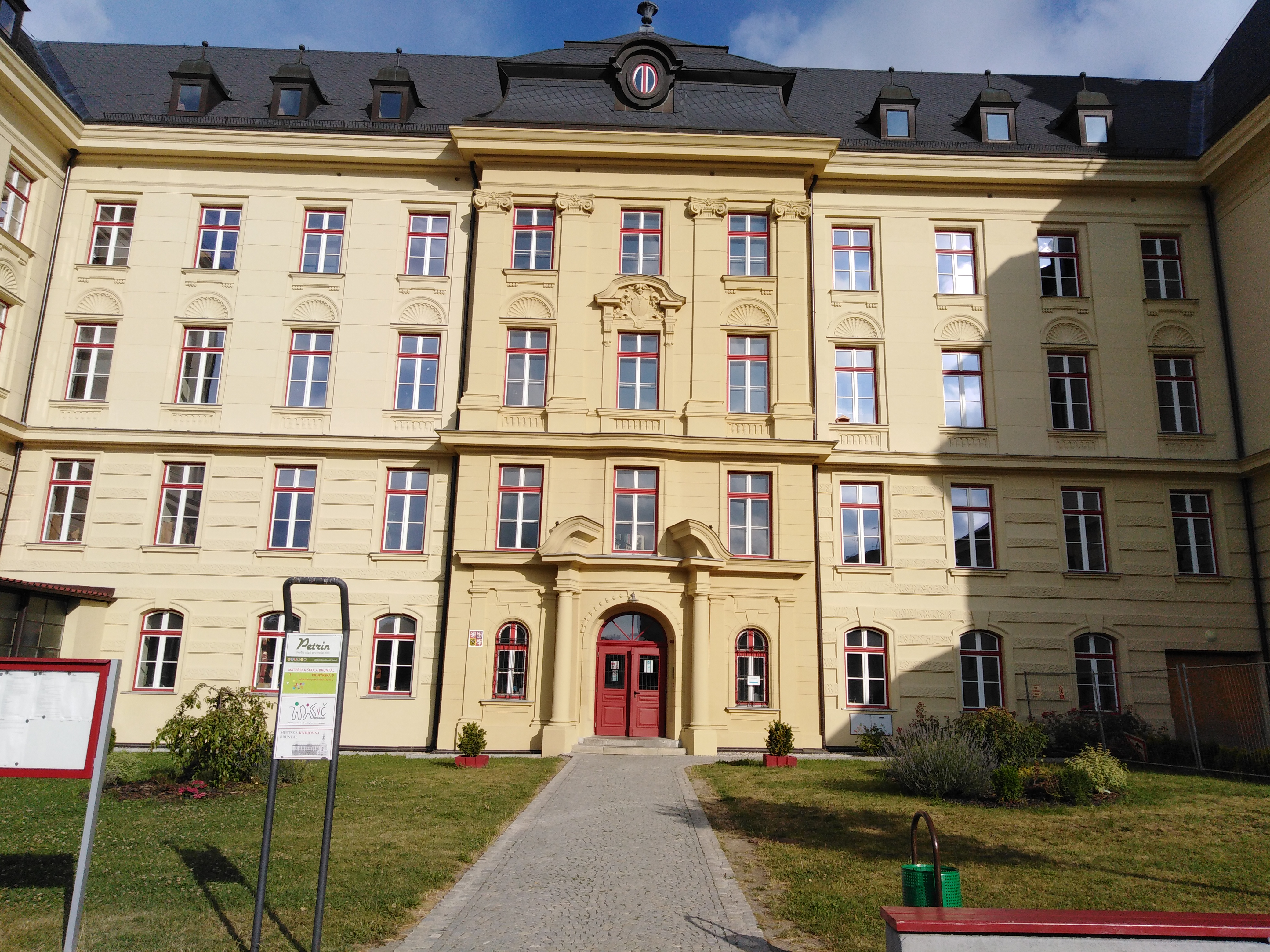 Budova Městské knihovny Bruntál - Základní škola Petrin.